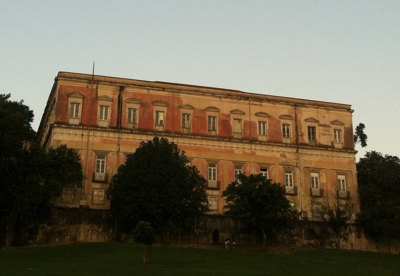 Quinta da Boa Vista